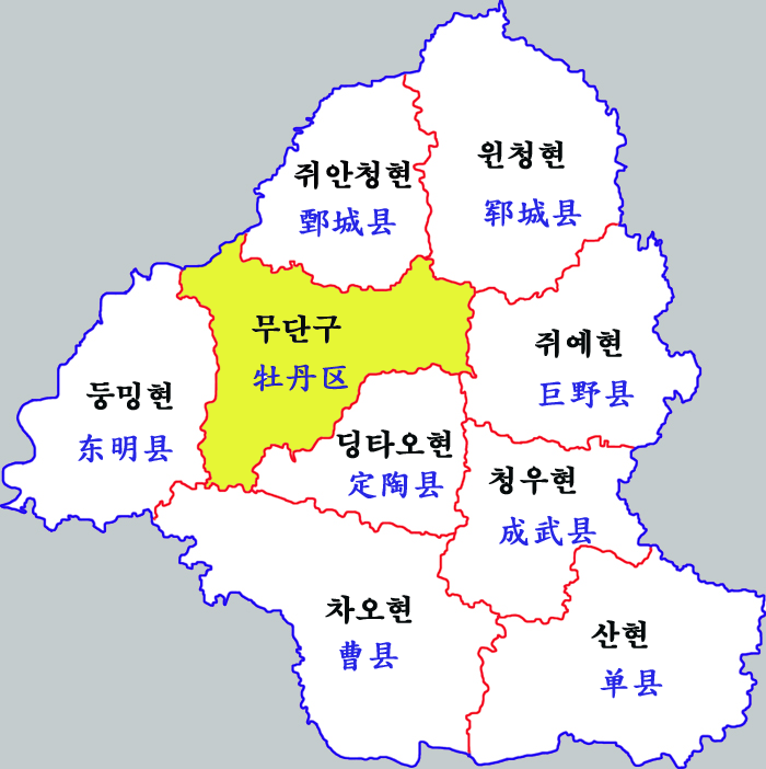 허쩌시 현급구역